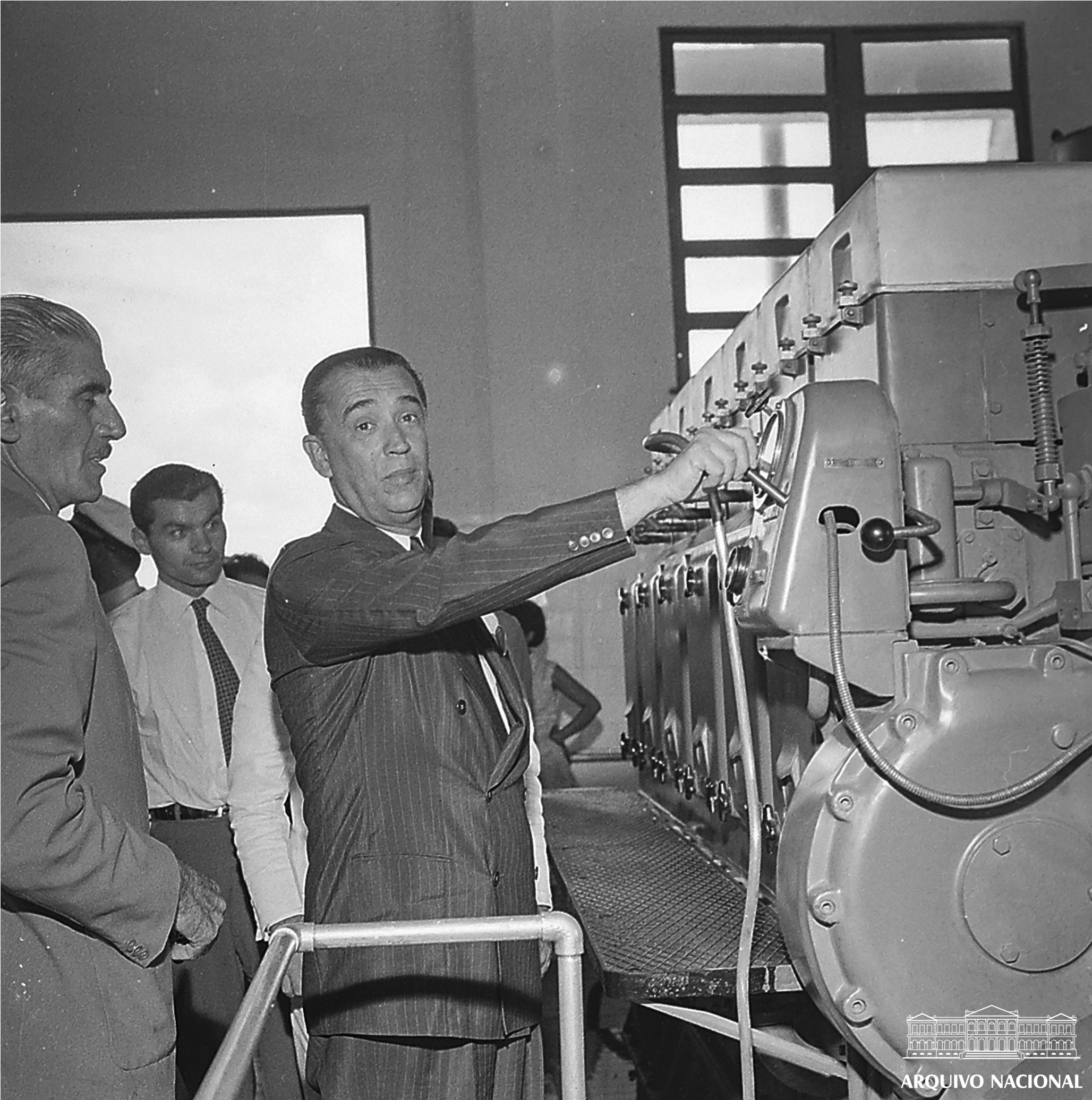 Presidente Juscelino Kubitschek inaugura a Refinaria de Petróleo de Manaus, 3 de janeiro de 1957.